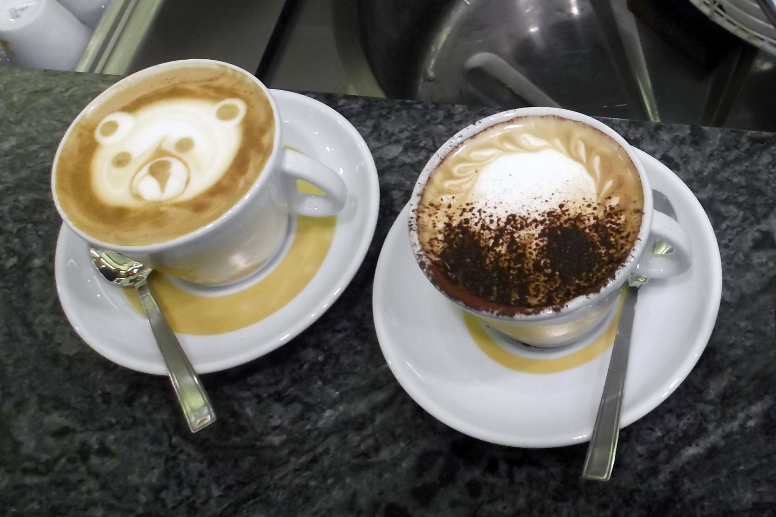 Two cappuccini at Tazza d'Oro cafè in Rome, Italy.